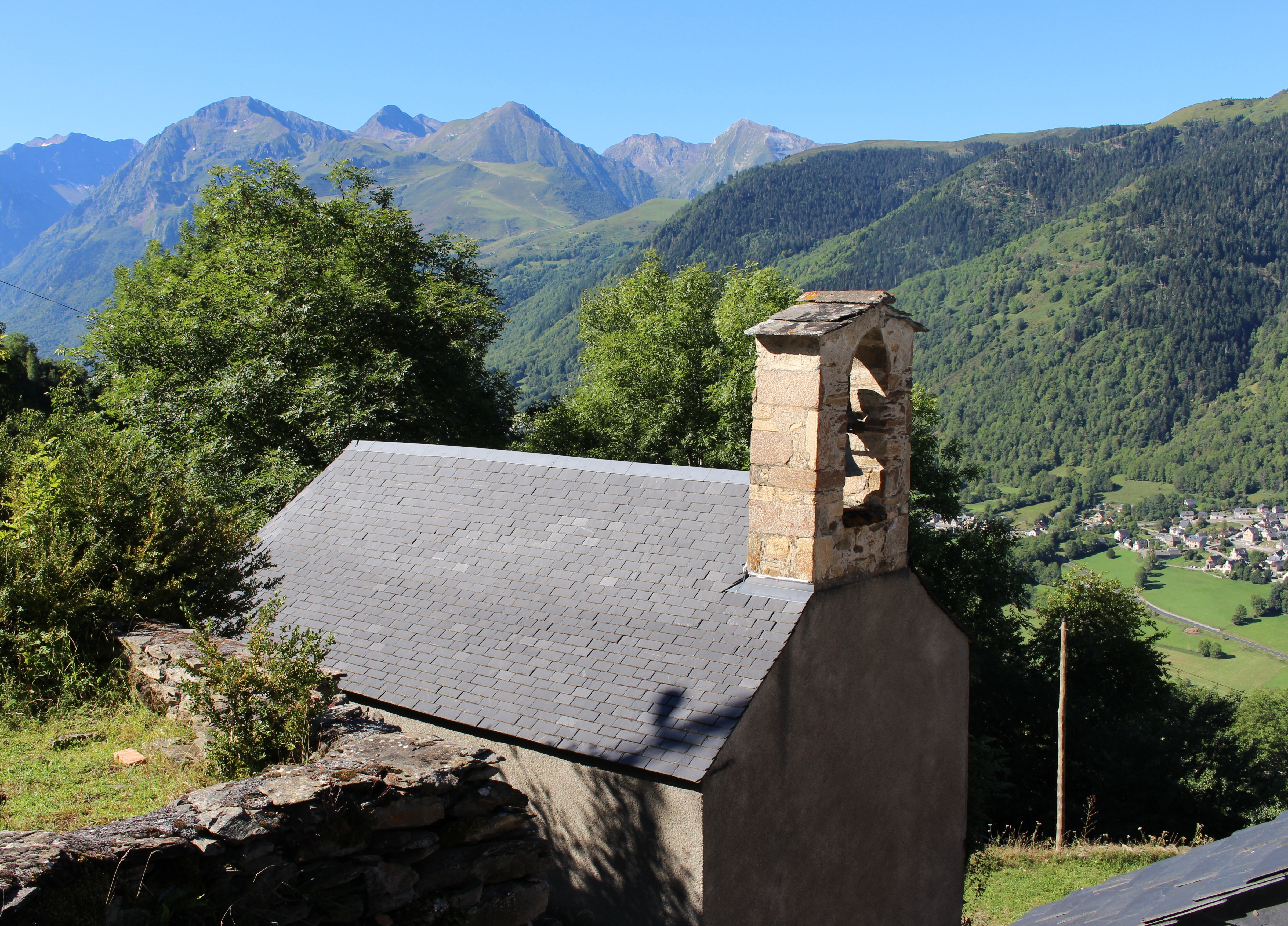 Chapelle Saint-Saturnin de Cazaux-Debat (Hautes-Pyrénées)